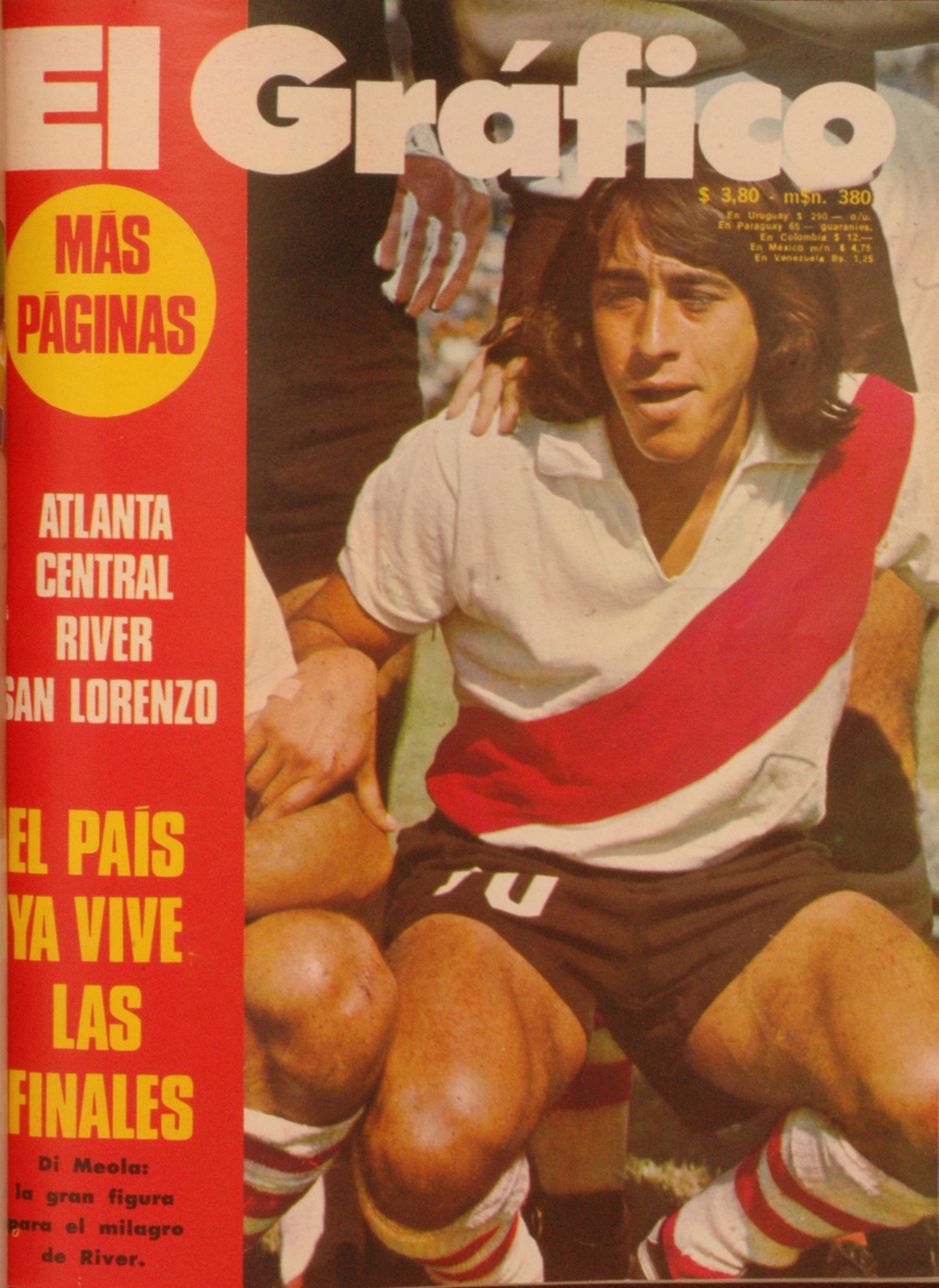 El Grafico del 18 de Diciembre de 1973. Edicion 2828